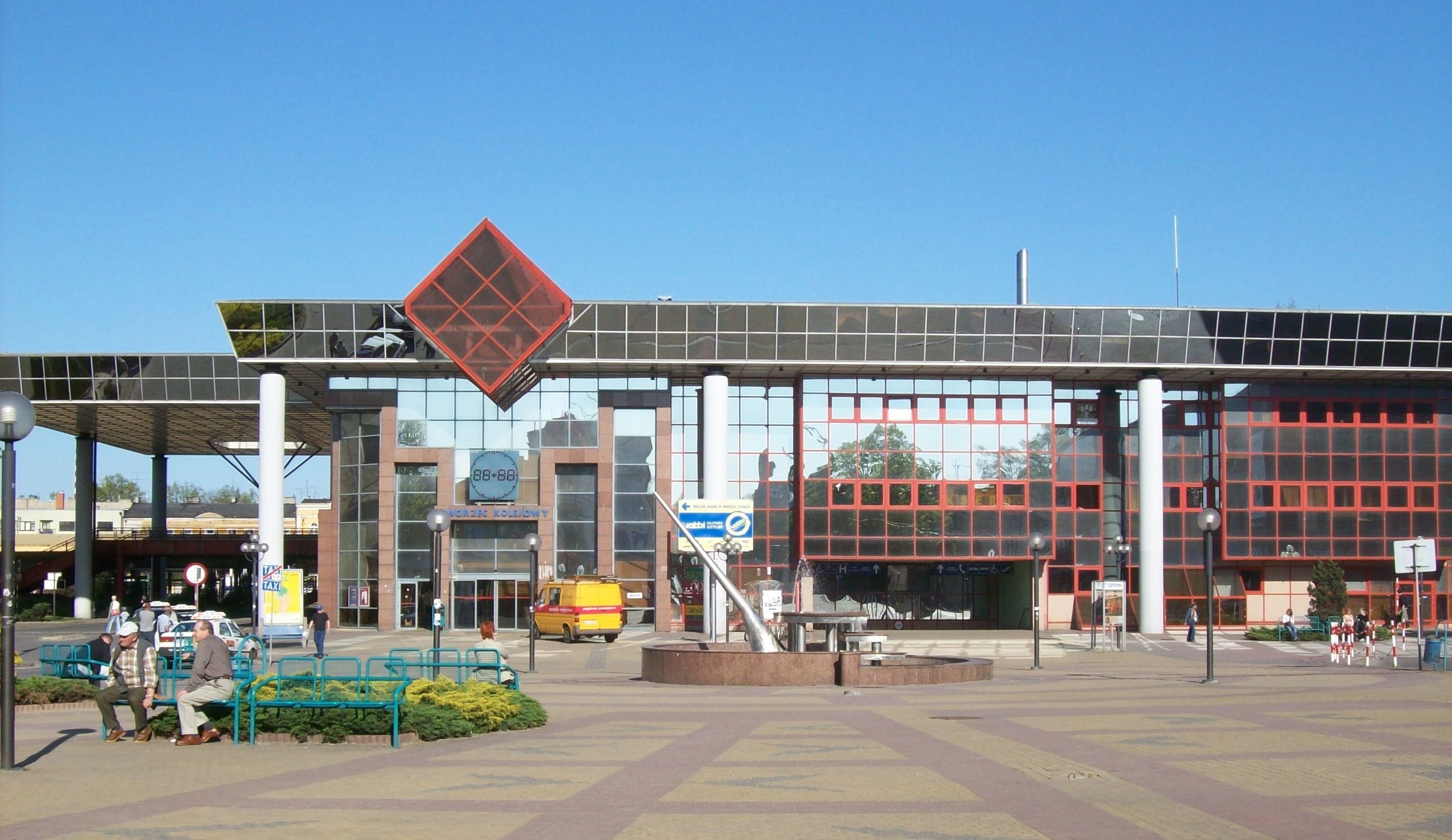 Dworzec główny w Częstochowie.